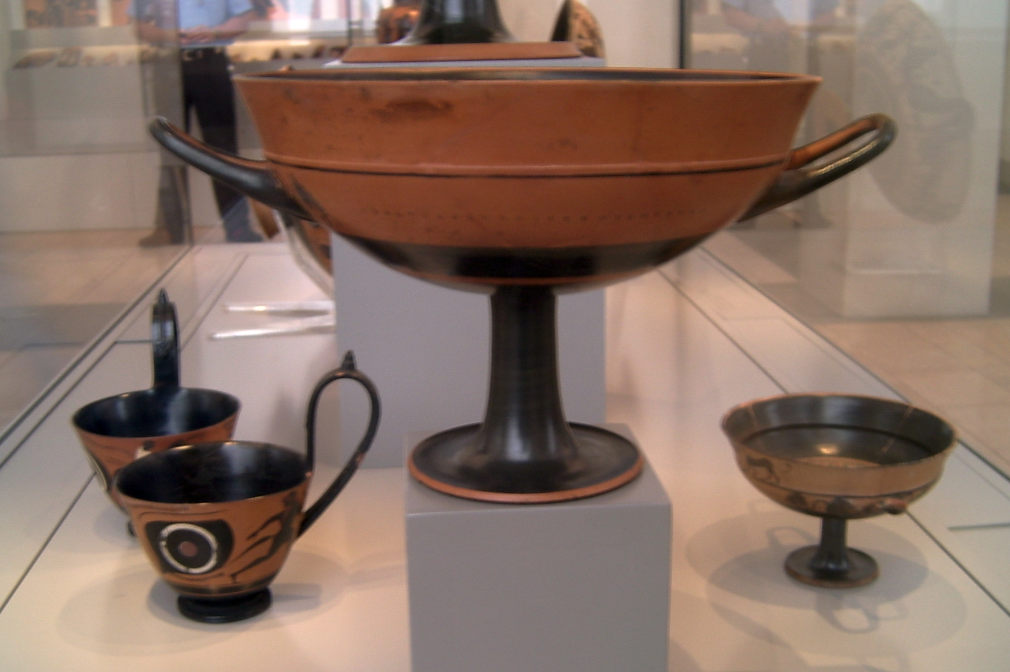 Kleinmeistervitrine der Antikensammlung Berlin, Altes Museum, vorn Randschale des Ergotimes, rechts des Xenokles